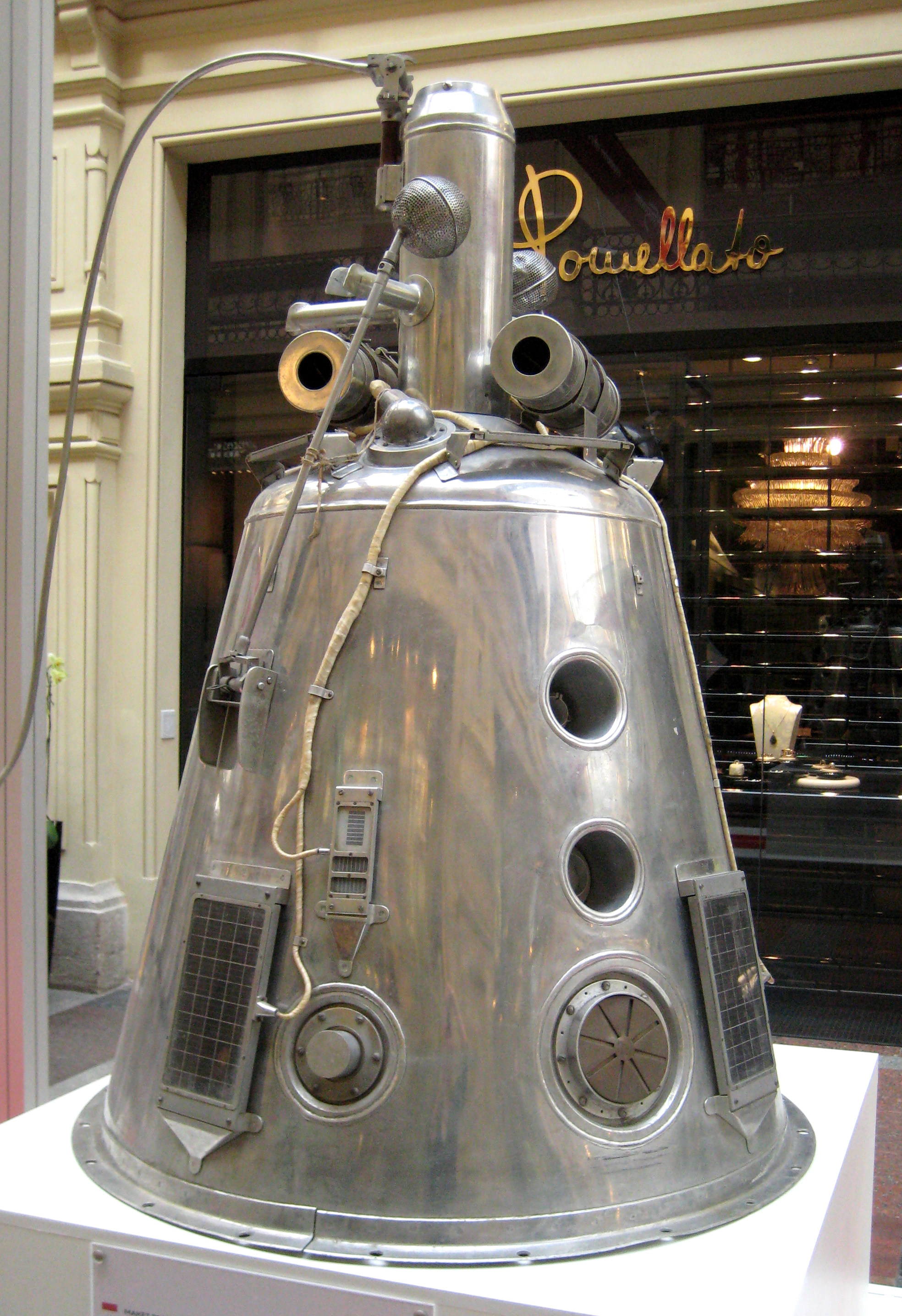 Макет 3-го искусственного спутника Земли. 1959 г. Выставка в ГУМе, 2011. Экспонат: Государственный центральный музей современной истории России